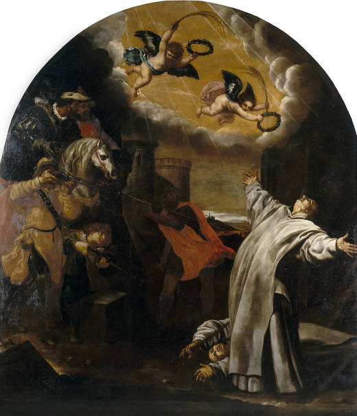 VEl martirio de Roermond de Vinzenz Herck y Jan van Loewen. Óleo sobre lienzo. Medidas: 337’5cm x 298’5cm.